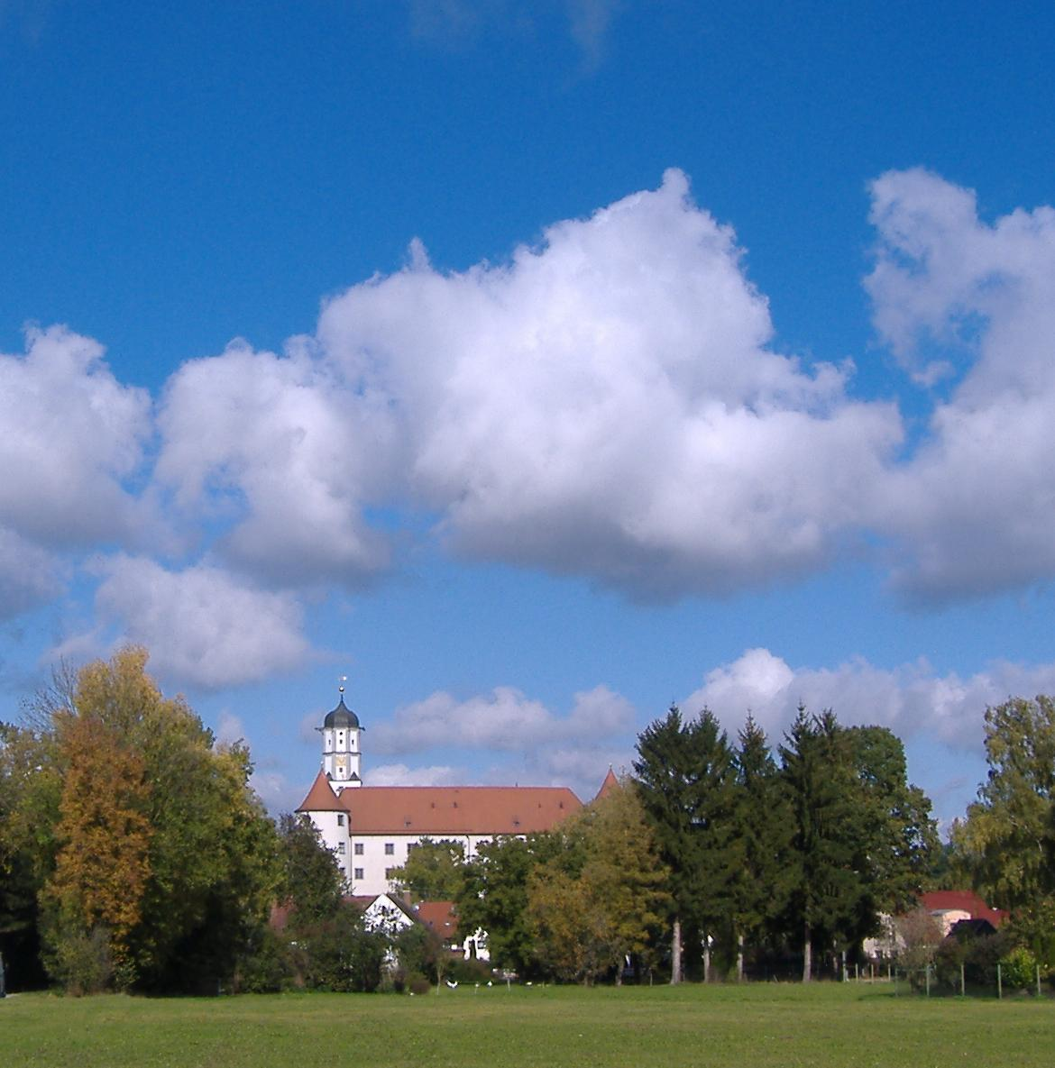 Höchstädt